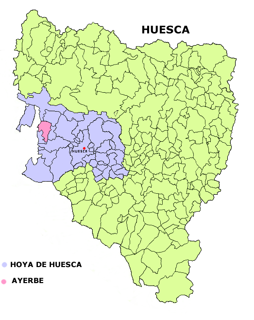 Mapa del municipio de Ayerbe Creado el 06.12.2005 por Dionisio en base a Image:Huesca municipalities.png